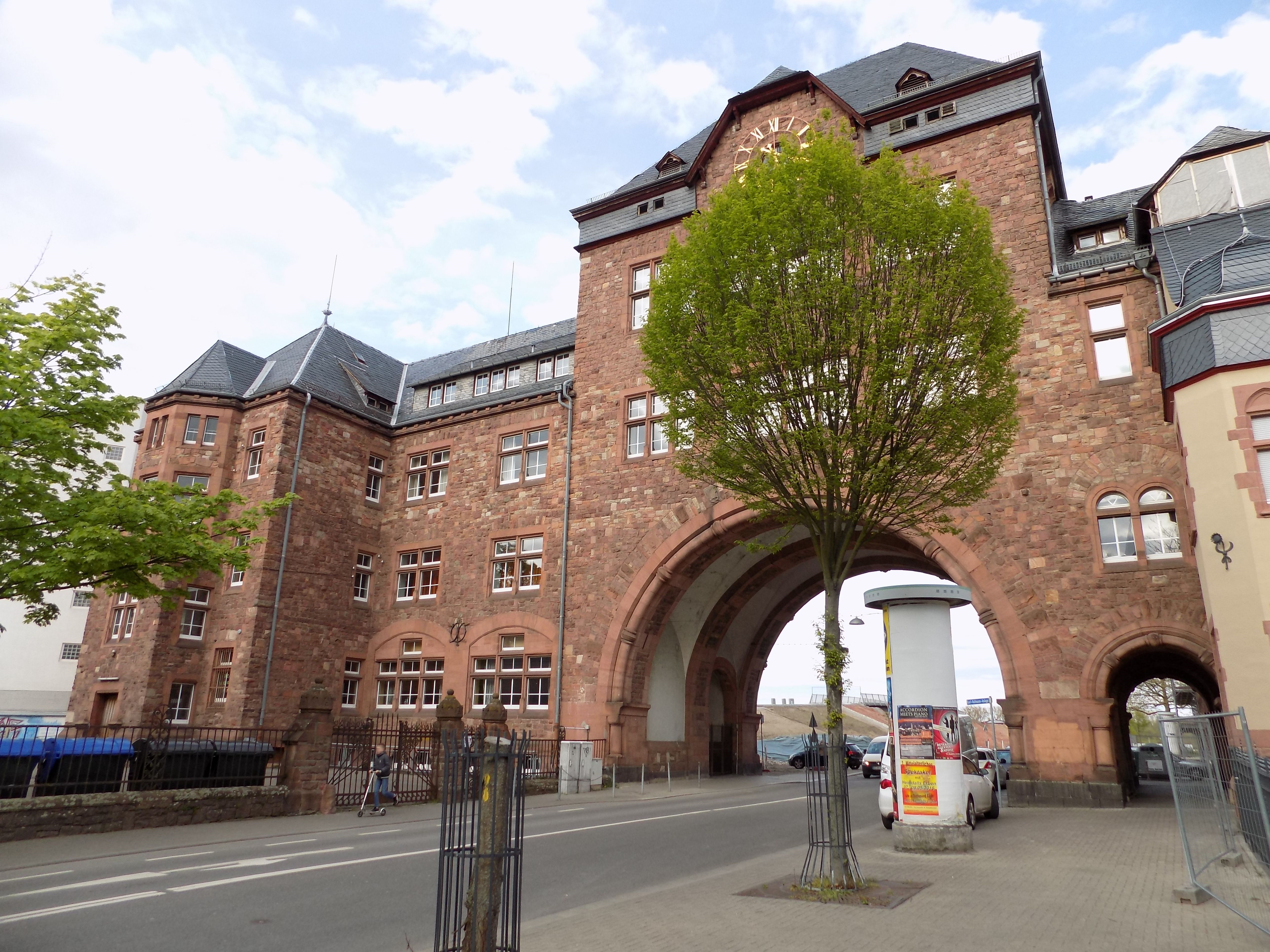 Nibelungenschule Worms Westen